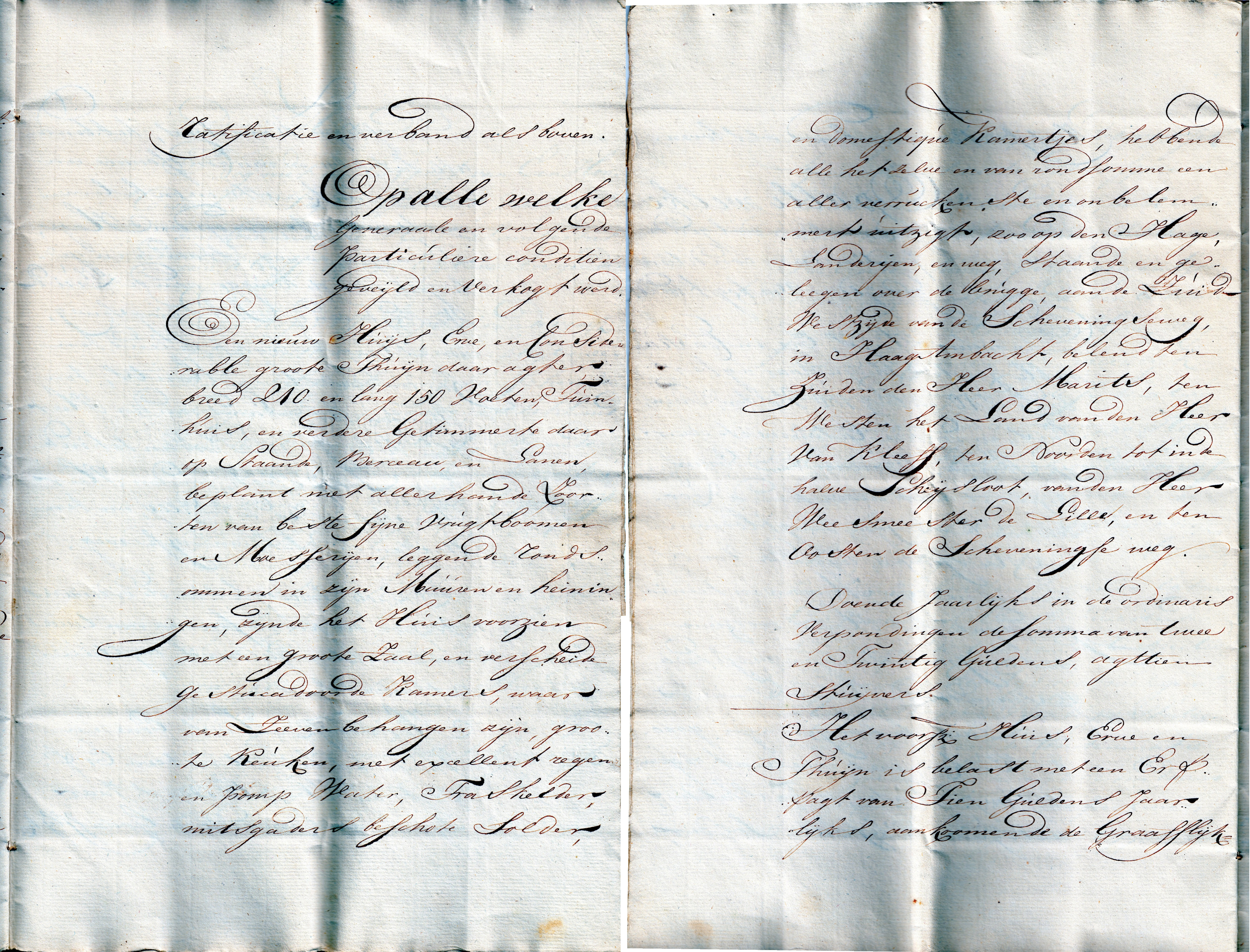 Twee pagina's van een veilingdocument uit 1786 met een beschrijving van het te veilen huis.